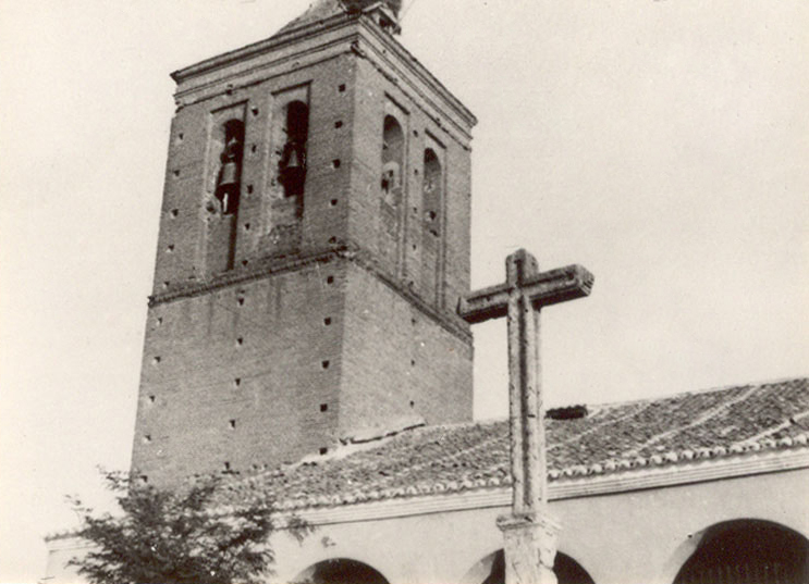 Iglesia parroquial de la Visitación - Villanueva de Duero (Valladolid) - Colección de cromos álbum de Valladolid editado por la Caja de Ahorros Provincial en 1962. Villanueva se alza sobre el llano y tiene un puente sobre el Adaja. En su iglesia estuvo depositado desde 1576 el cuerpo de Ana Colón, marquesa de Jamaica. - Fotografía 60 x 42 B/N